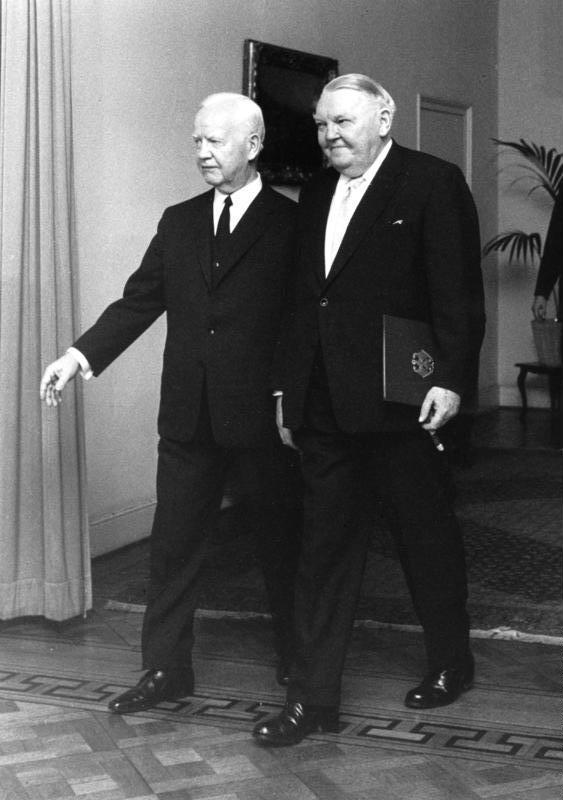 Bundespräsident Heinrich Lübke und Bundeskanzler Prof. Ludwig Erhard (re.), der am 1.12.1966 in der Villa Hammerschmidt, dem Bonner Amtssitz des Bundespräsidenten, seine Entlassungsurkunde erhielt.